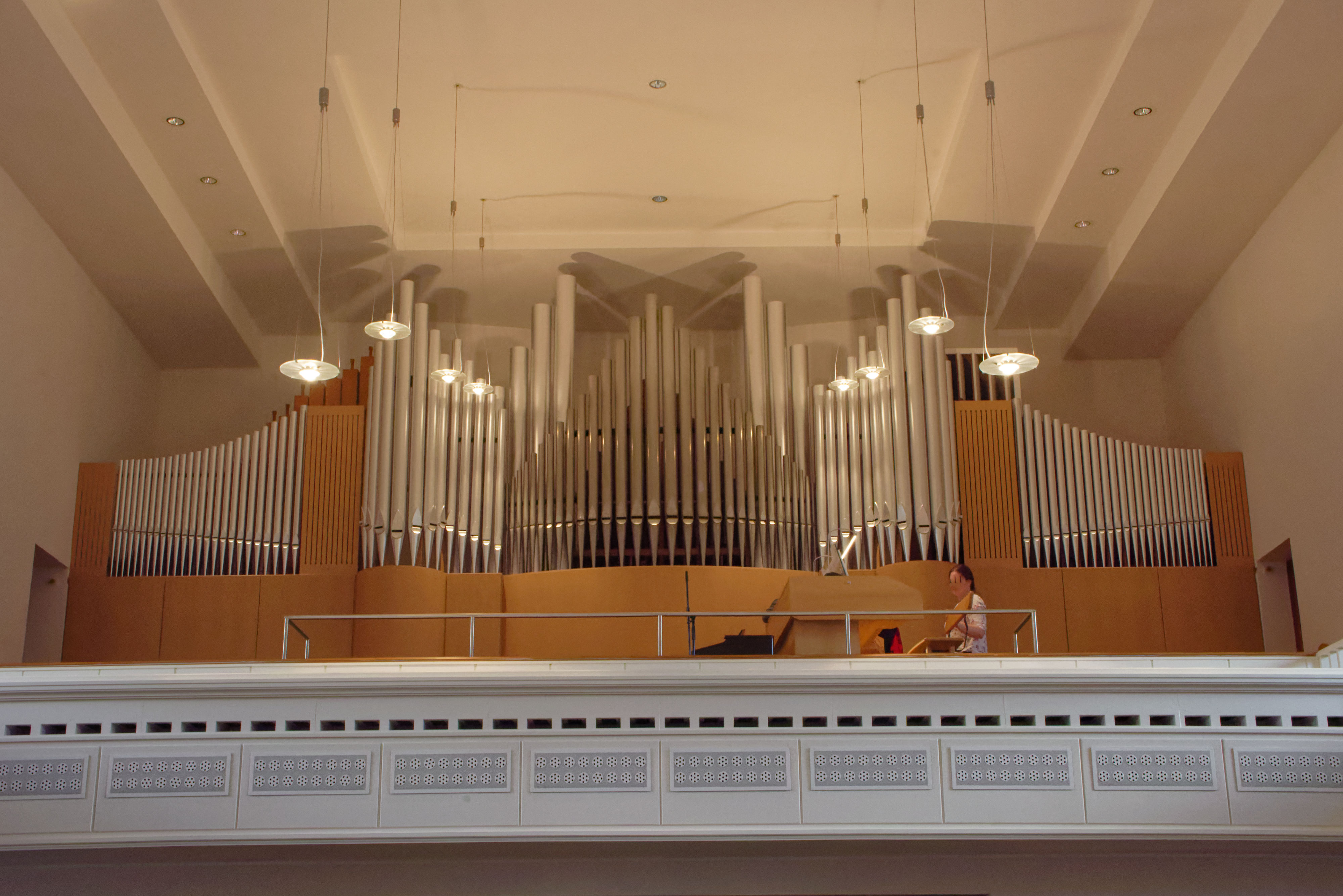 Dorper Kirche Solingen, Orgel